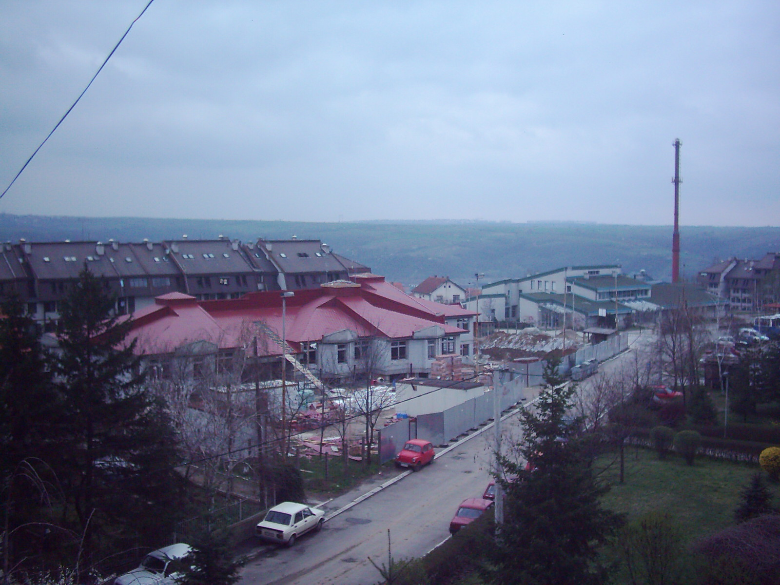 Слика изградње обданишта у реснику 2002